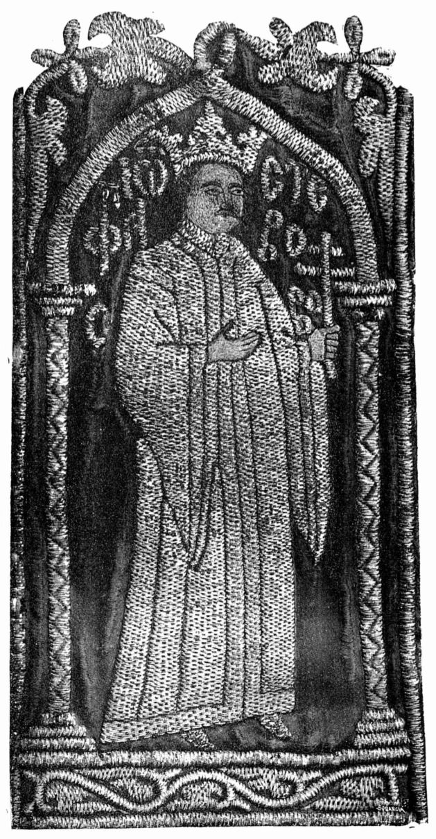 Ștefan cel Mare pe patrafirul Mănăstirii Dobrovăț - din Albumul Muzeului Național de Antichități din anul 1904